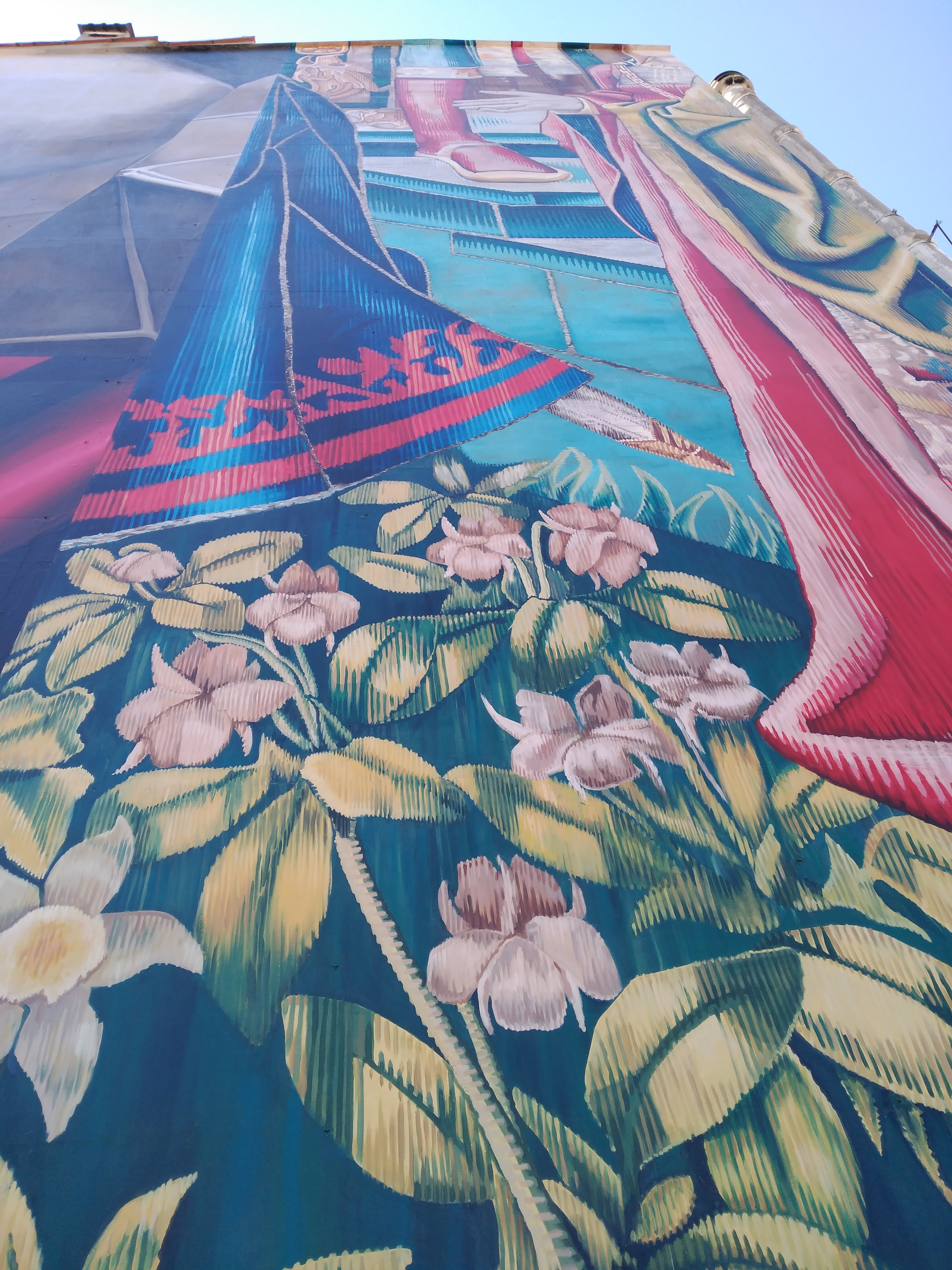 Proyecto seleccionado en el marco de una convocatoria por invitación para la realización de una propuesta artística en el centro histórico de Lleida. El mural ilustra la importancia de crear conexiones y acercamientos culturales e intelectuales para un desarrollo amplio y pleno de la ciudad y sus ciudadanos. Tomando como punto de partida el concepto de “doblar”.